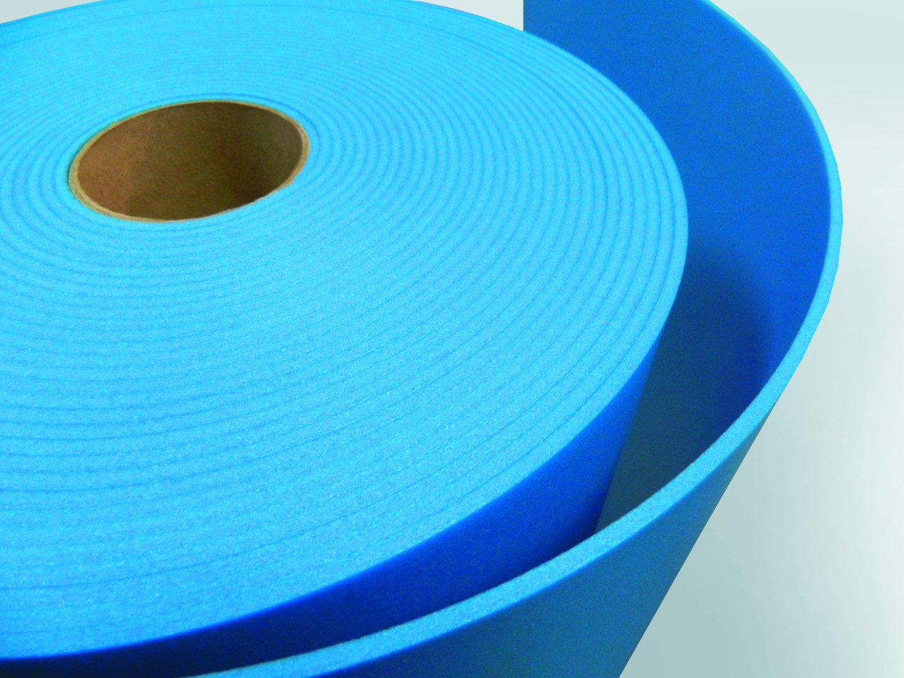 Рулон физически сшитого пенополиэтилена с характерной гладкой поверхностью